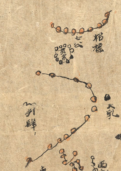 粵語: 天市垣，右垣，來自敦煌莫高窟古卷星圖